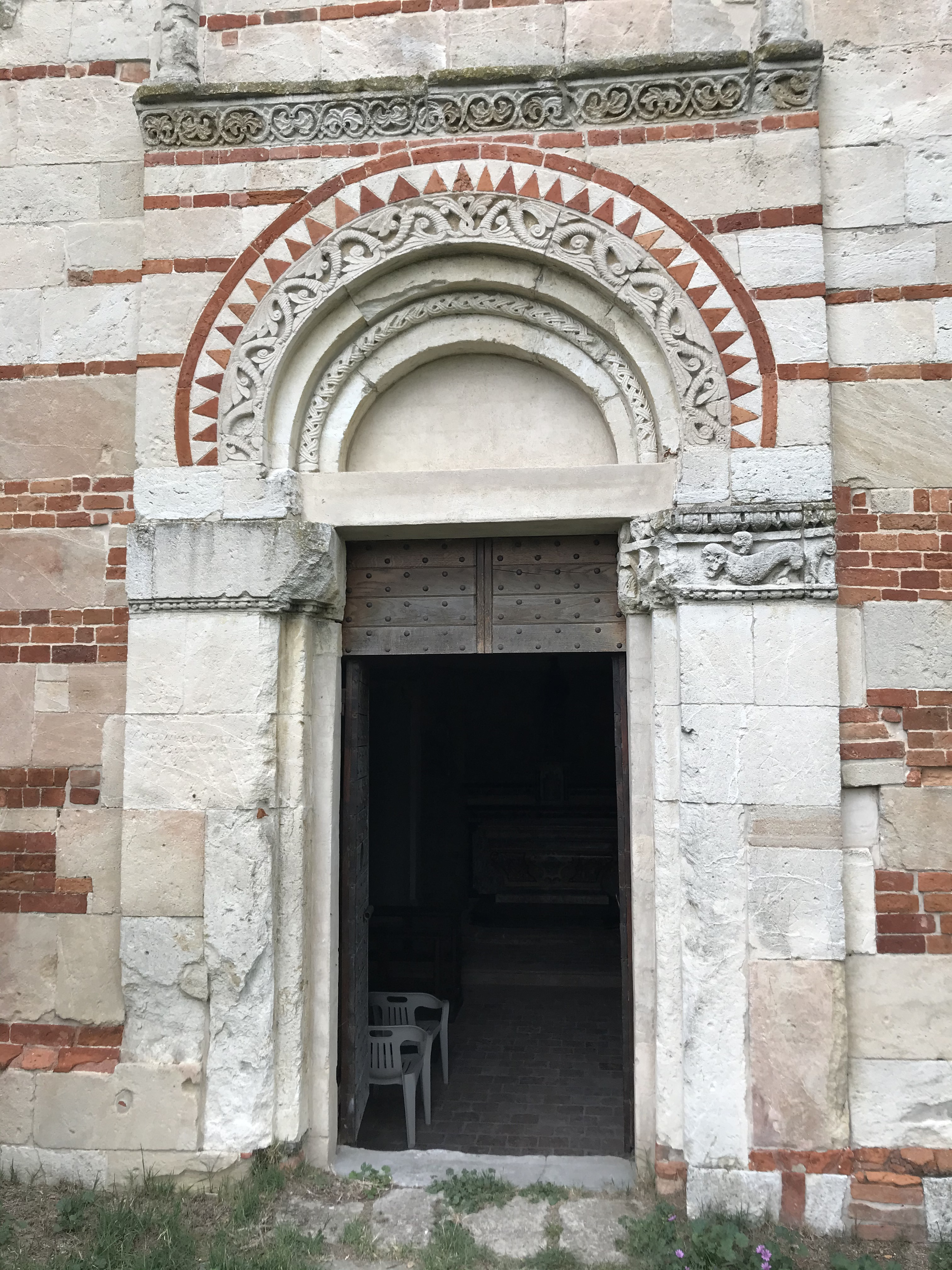 Ingresso della chiesa dei Santi Nazario e Celso, Montechiaro d'Asti.